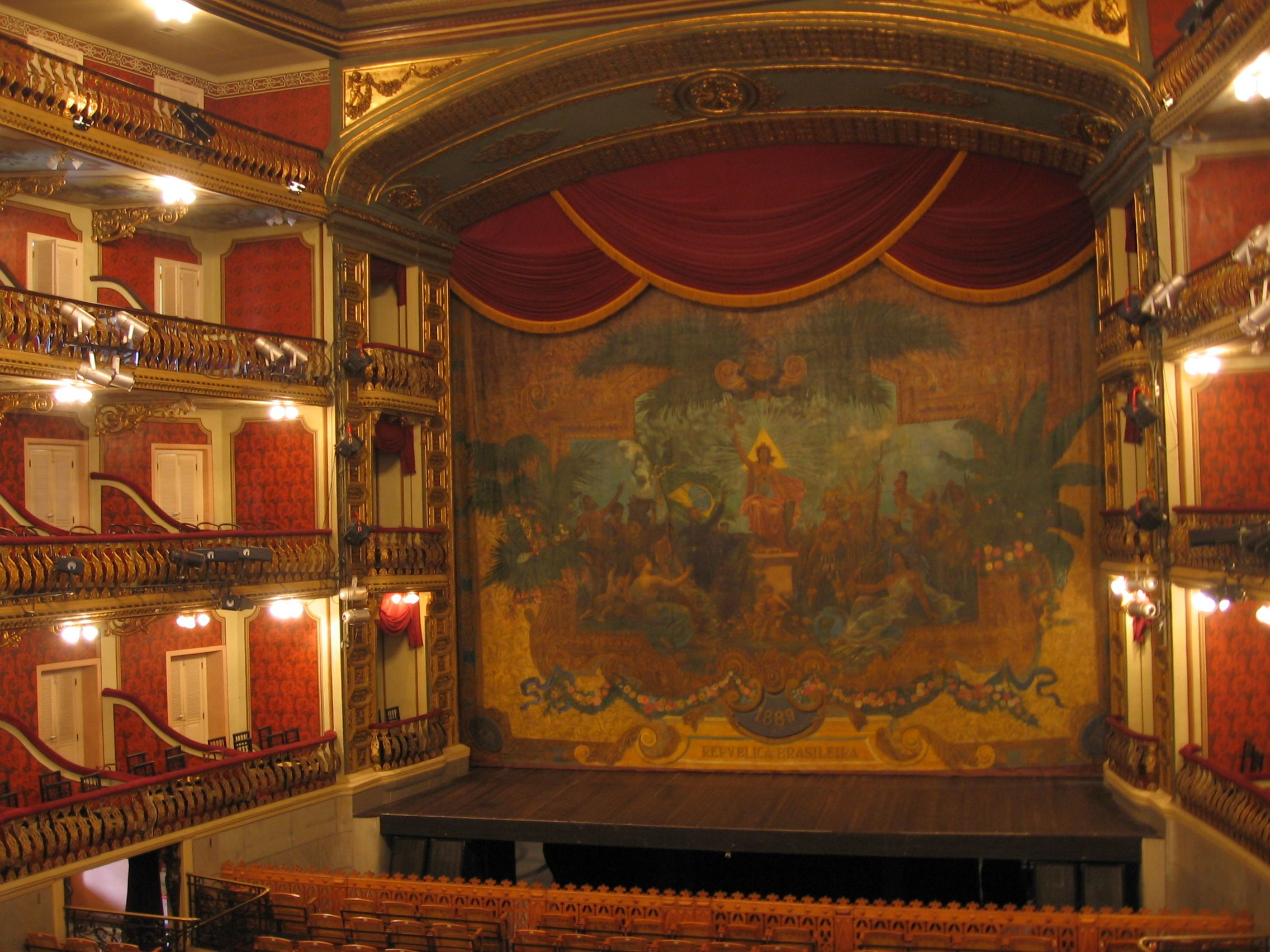 Theatro da Paz, Belém, Brasil